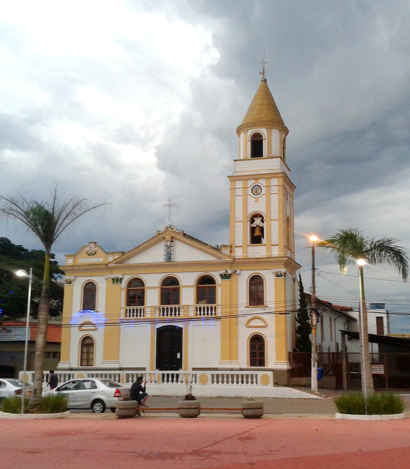 Igreja de Nossa Senhora do Monte Serrate, na Praça da Matriz, Cotia, SP, Brasil.